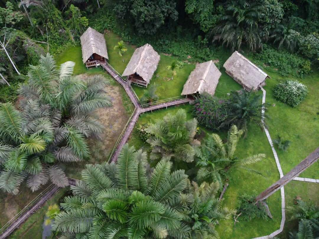 Cabanes, Nkolmetet, Sud Cameroun